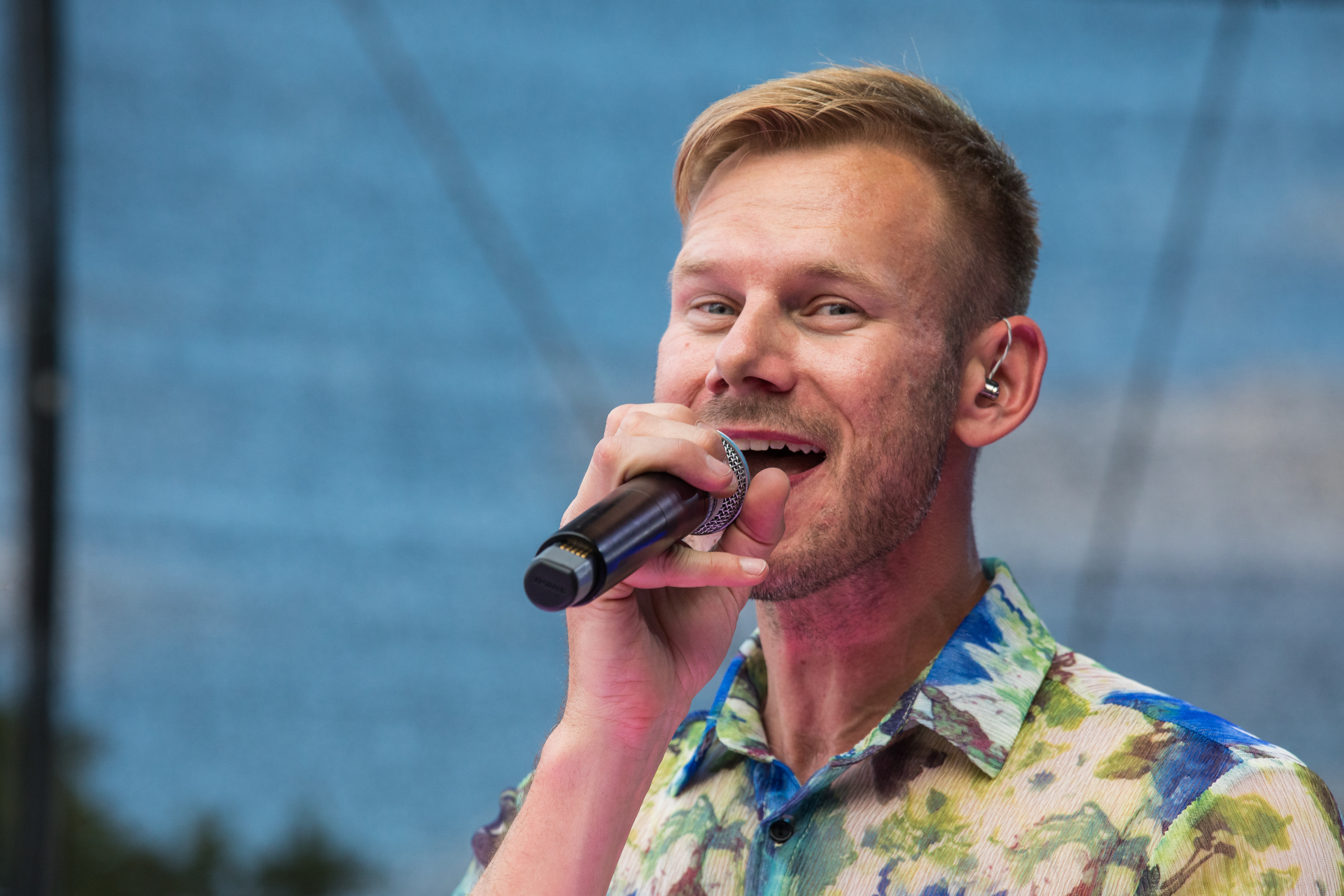 ColognePride/CSD 2018 - Auftritt von Tom Hugo auf der Hauptbühne auf dem Heumarkt